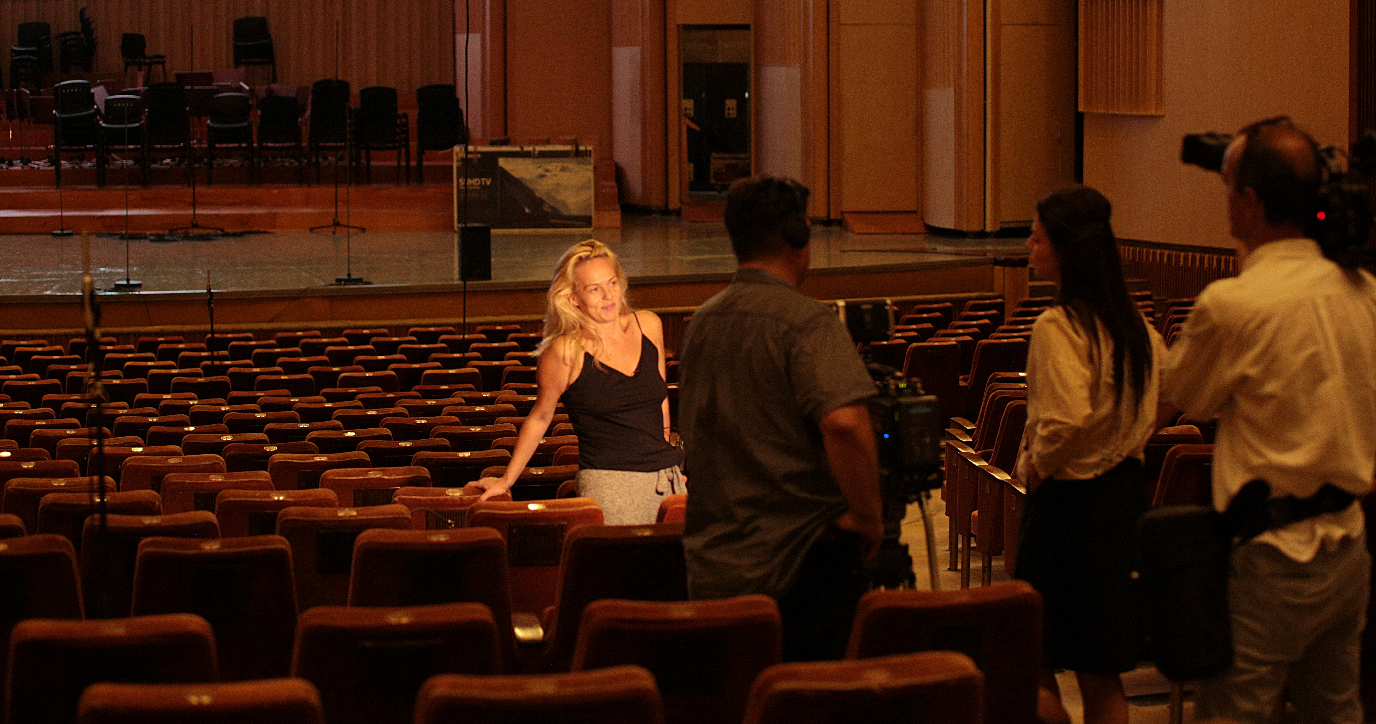 Multimedia Director at George Enescu Festival 2017